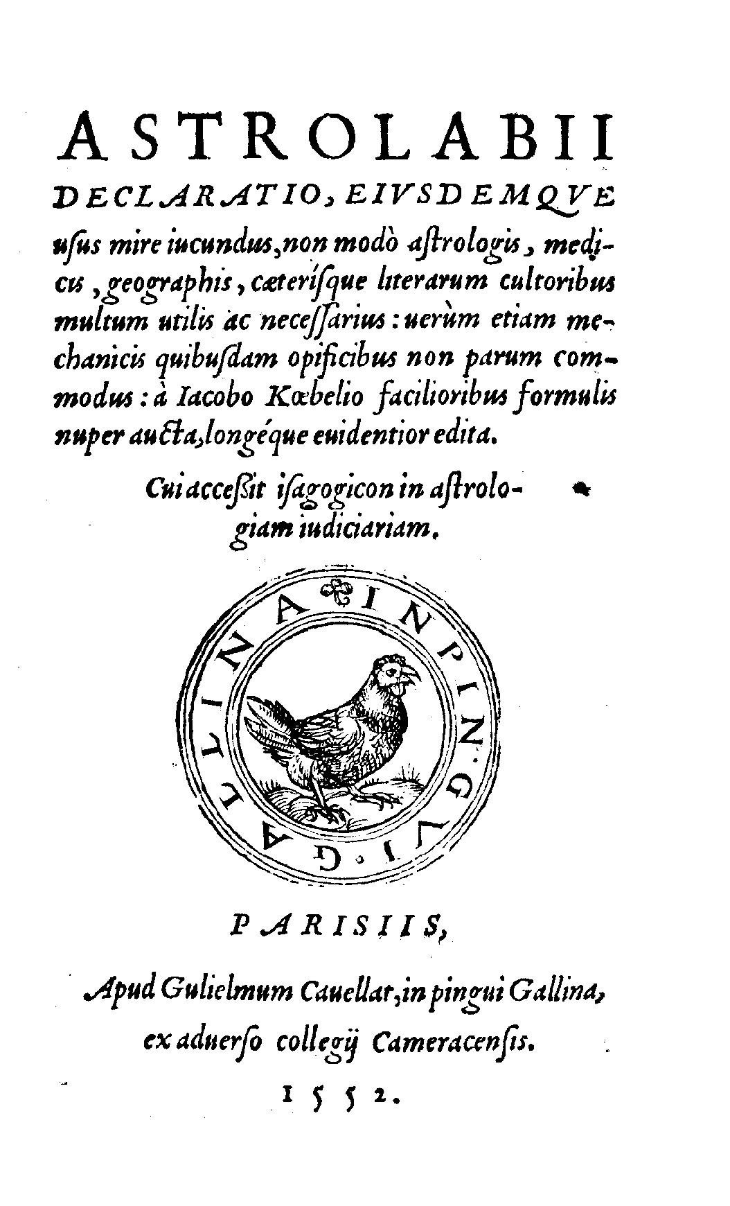 Frontespizio